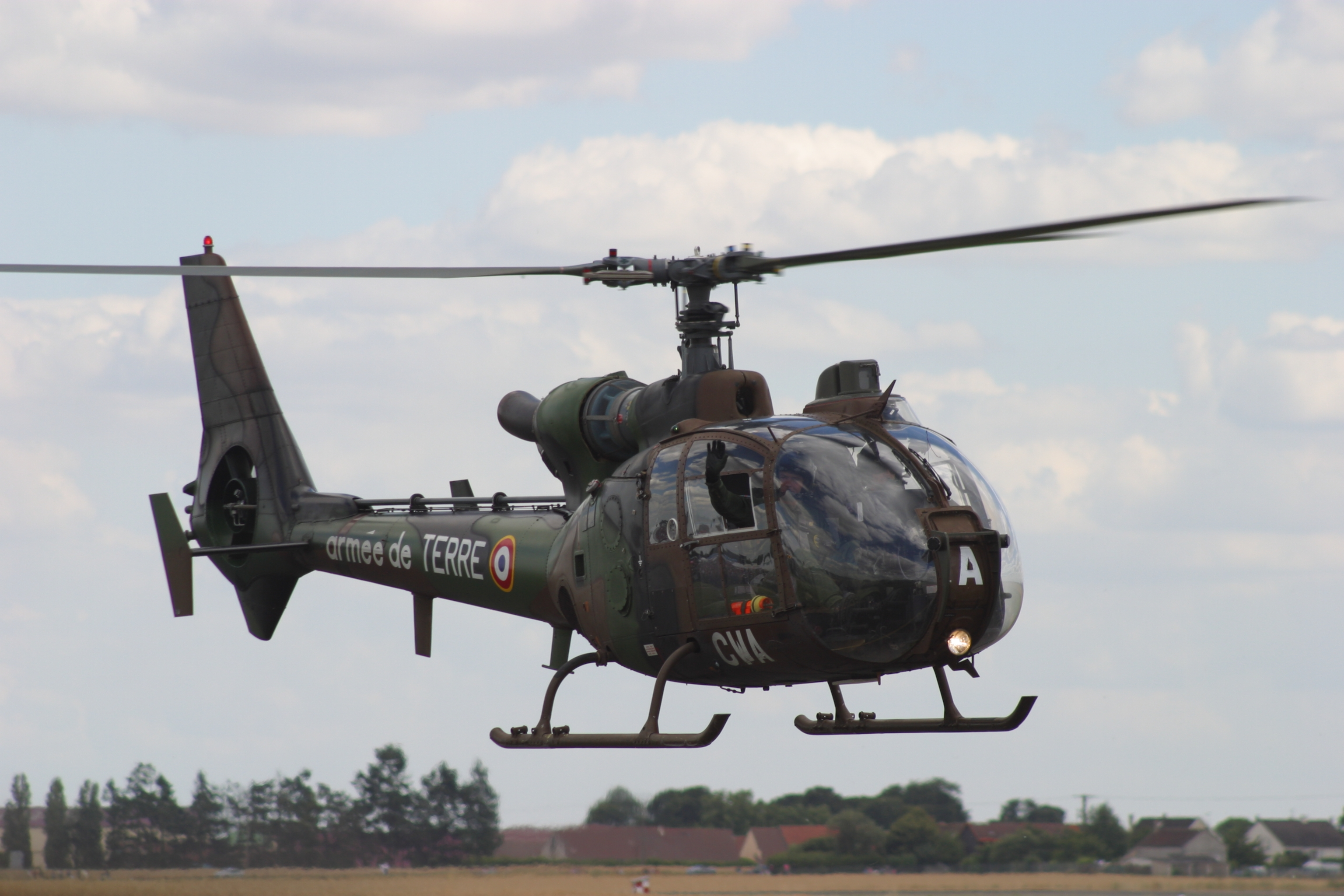 Hélicoptère Gazelle